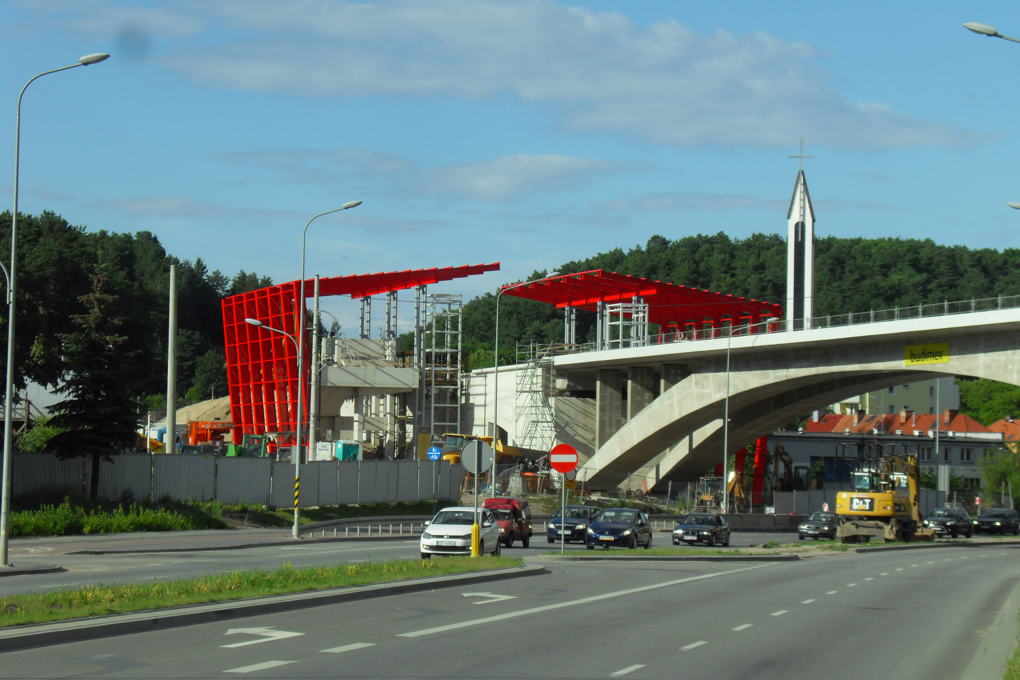 Przystanek Pomorskiej Kolei Metropolitalnej (PKM) Gdańsk Niedźwiednik w budowie.